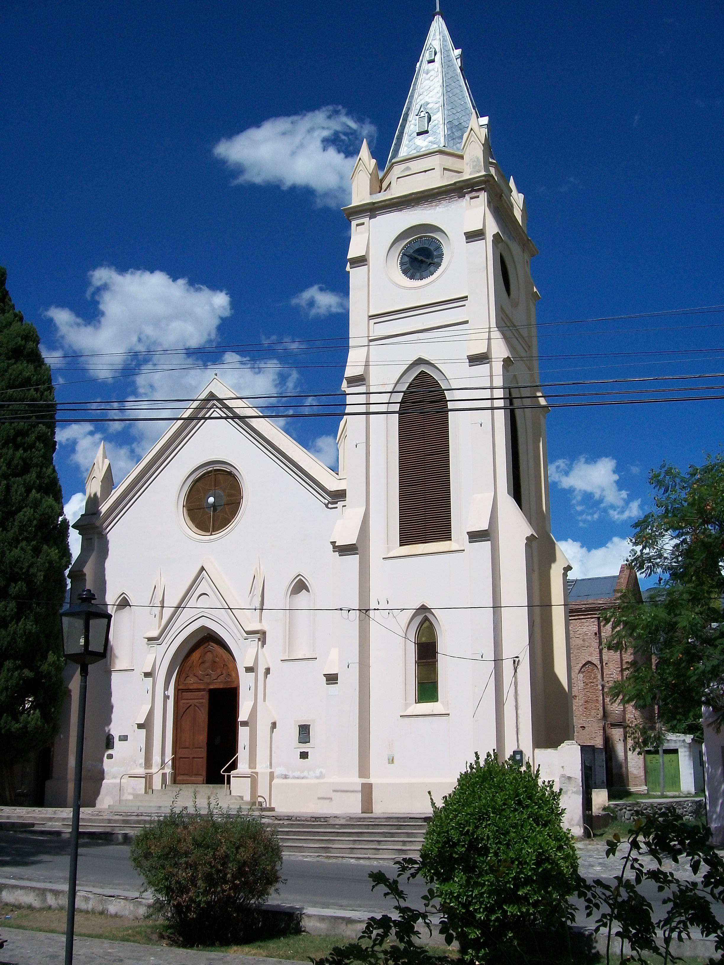 Iglesia de la localidades de San Javier y Yacanto, Traslasierra, Córdoba, Argentina